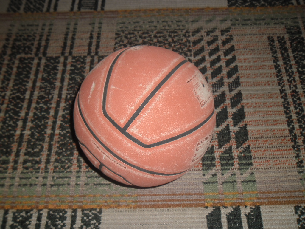 košarkaška lopta